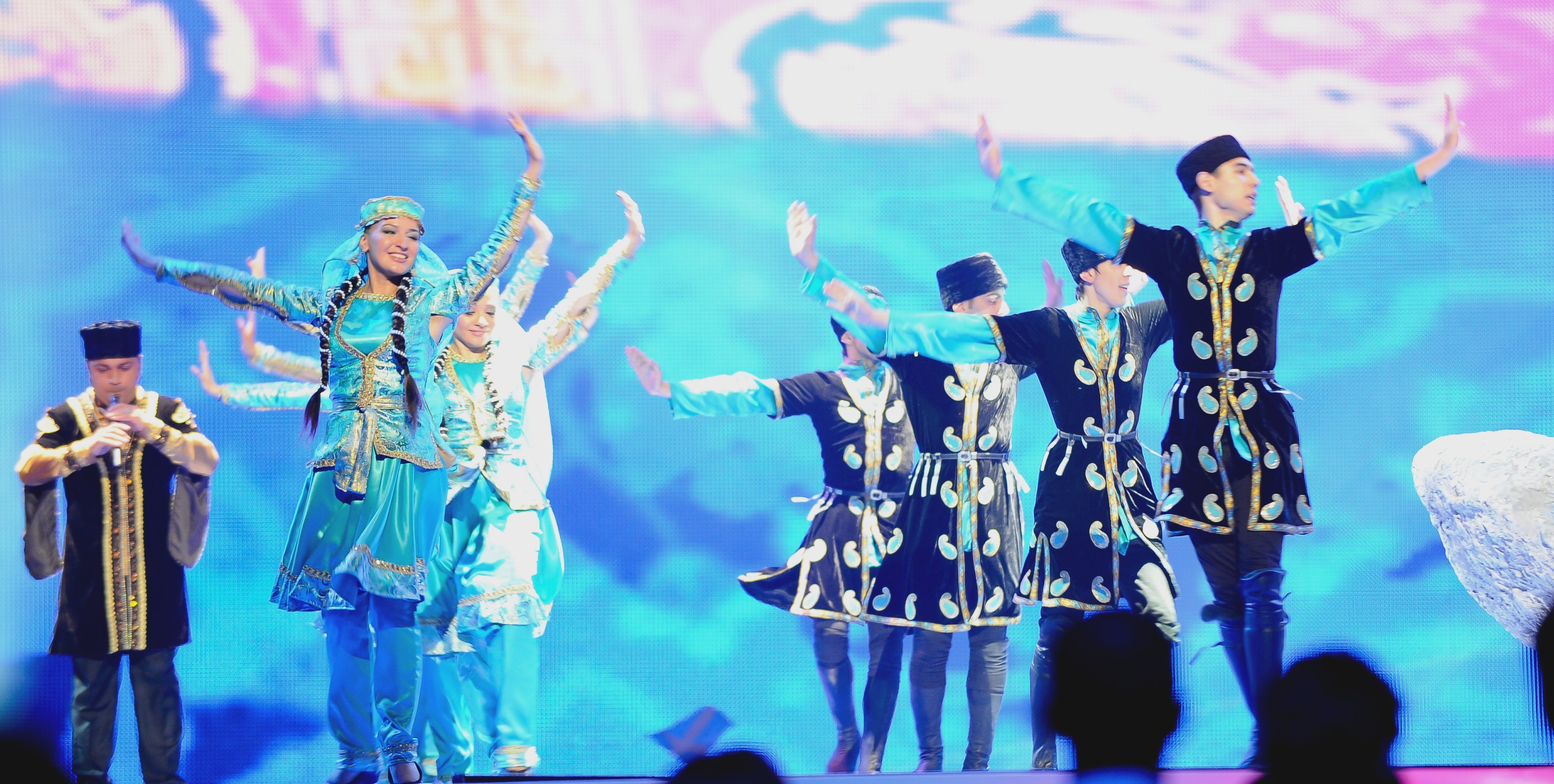 Танцоры на сцене Baku Crystal Hall